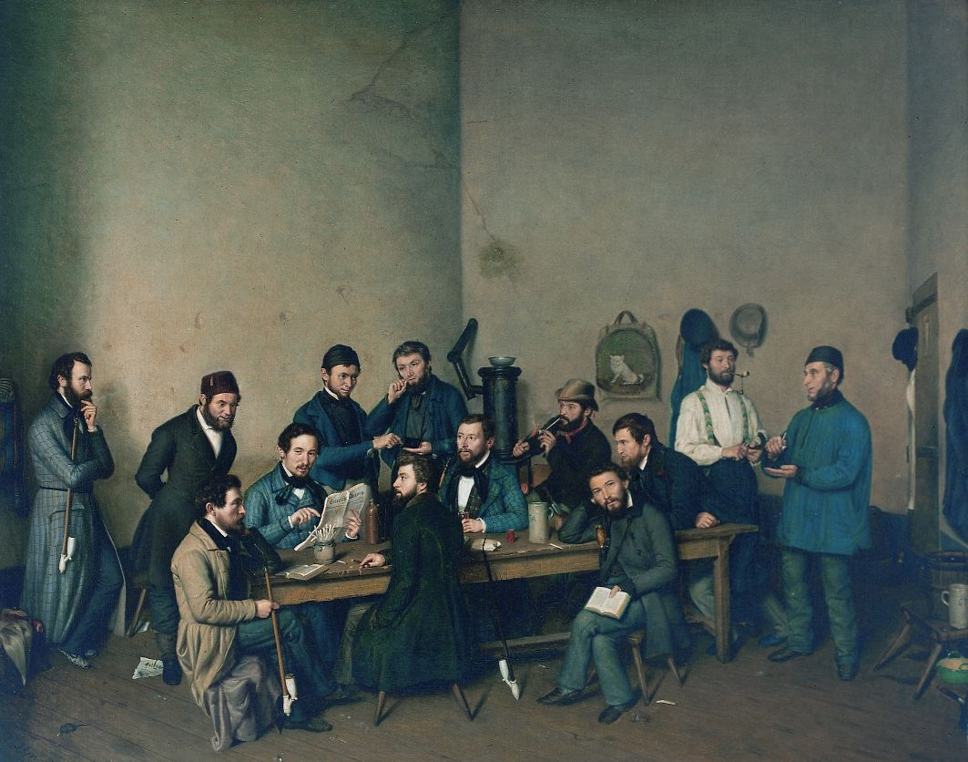 Johann Velten: "Eine Gefängnisscene", 1849, Öl auf Leinwand, 78 x 93 cm, Stadtmuseum Simeonstift Trier